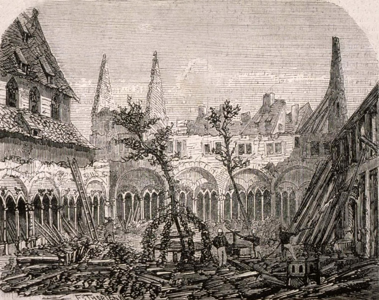 Incendie du Collège Saint Guillaume à Strasbourg, le 29 juin 1860 Hepp, M.e., illustrateur Thorion, F., graveur